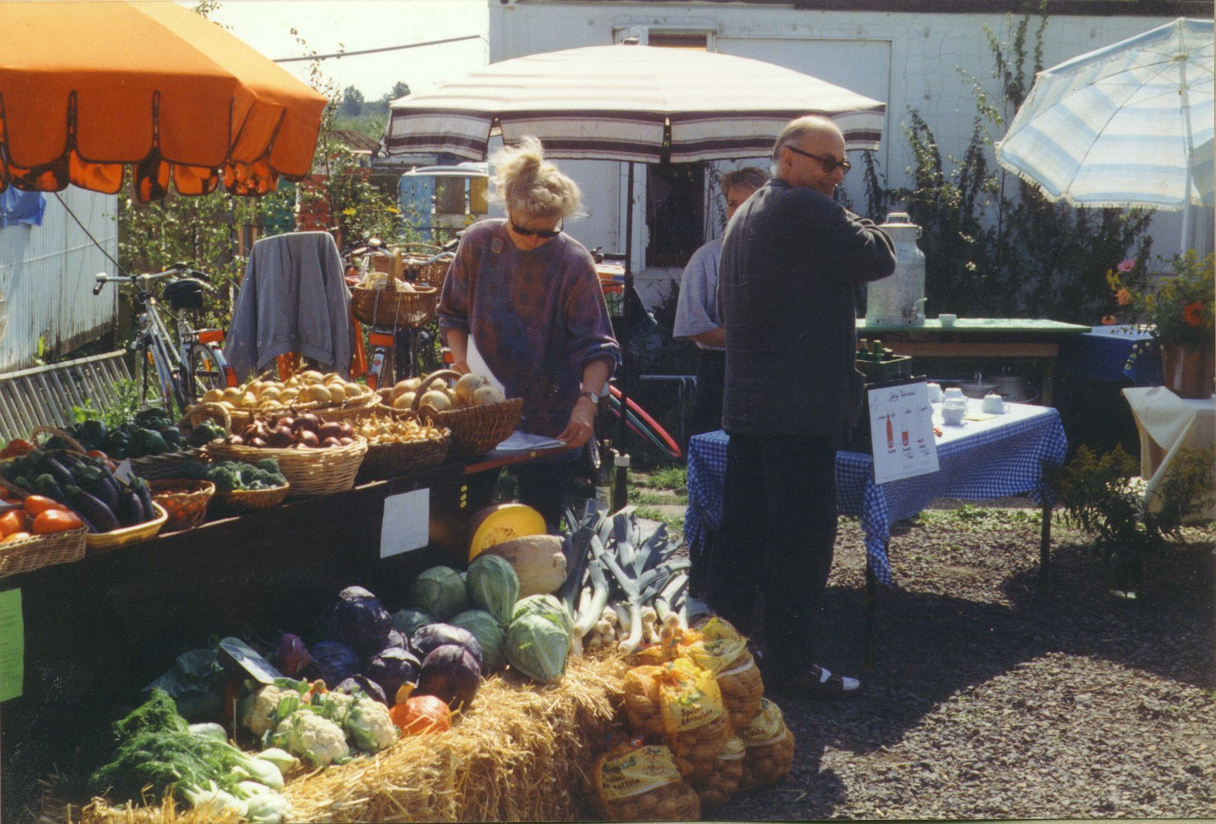 Erntefest der Bremer EVG auf der Kinder- und Jugendfarm in Habenhausen